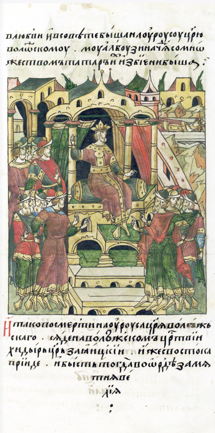 ЛИЦЕВОЙ ЛЕТОПИСНЫЙ СВОД И после смерти Науруса, царя Волжского, на Волжском царстве сел Хидырь, царь Заяицкий, который пришел с востока. И была тогда в Орде смута великая.